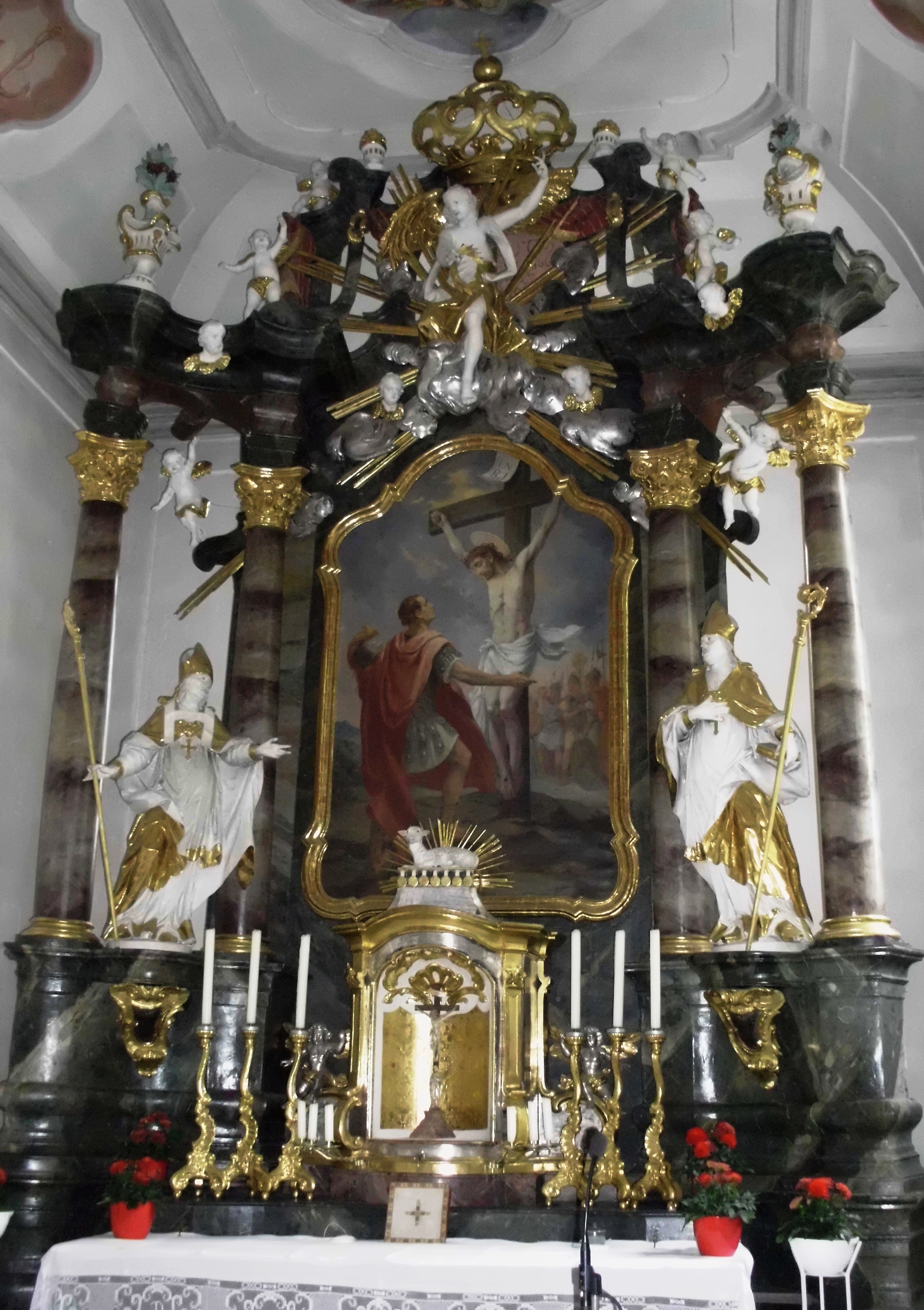 Bergheim, Landkreis Neuburg-Schrobenhausen, Kirche St. Mauritius, Hauptaltar